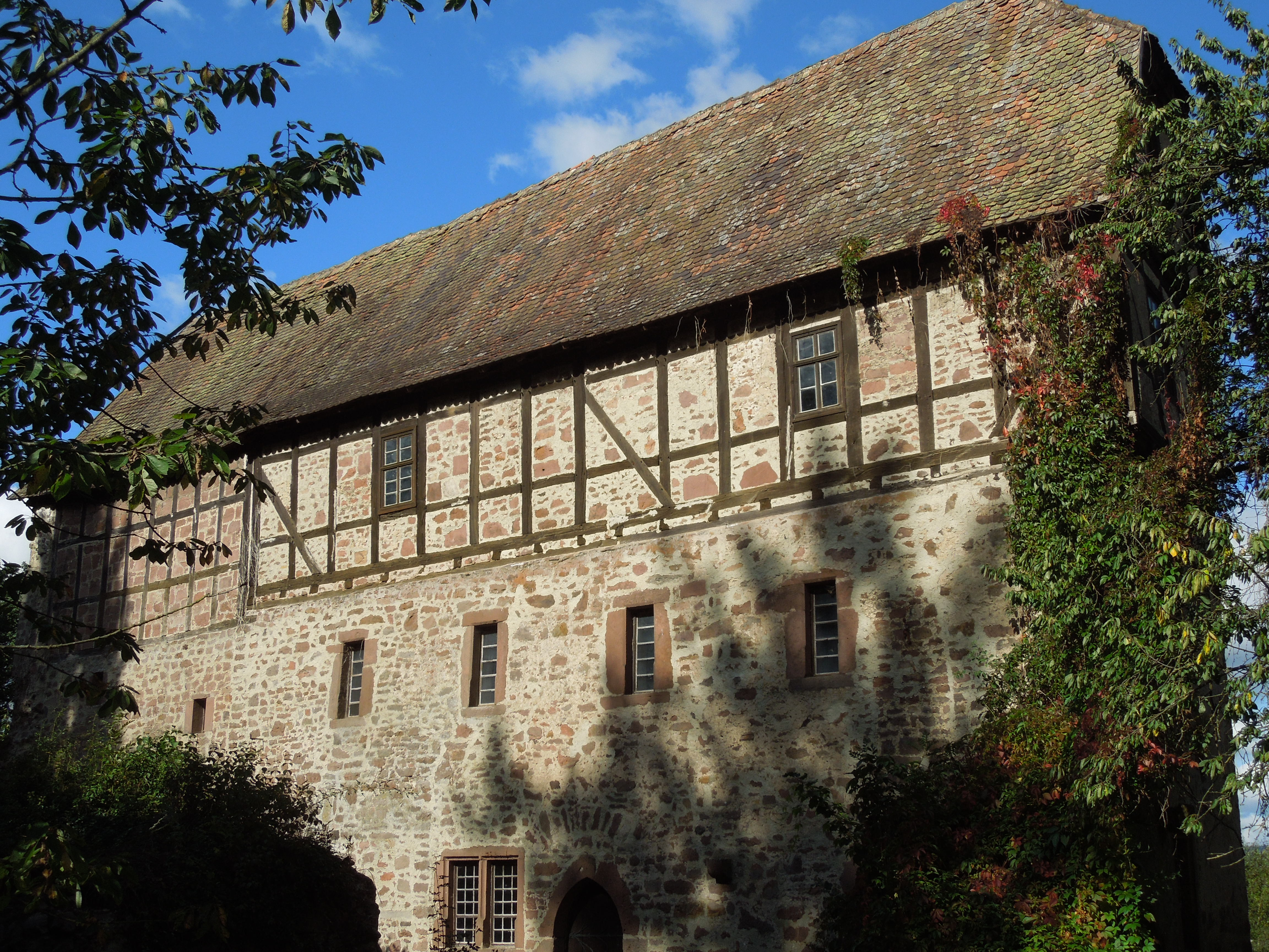 Der Palas ("Langer Bau") der Urff'schen Burg, gesehen von Südosten